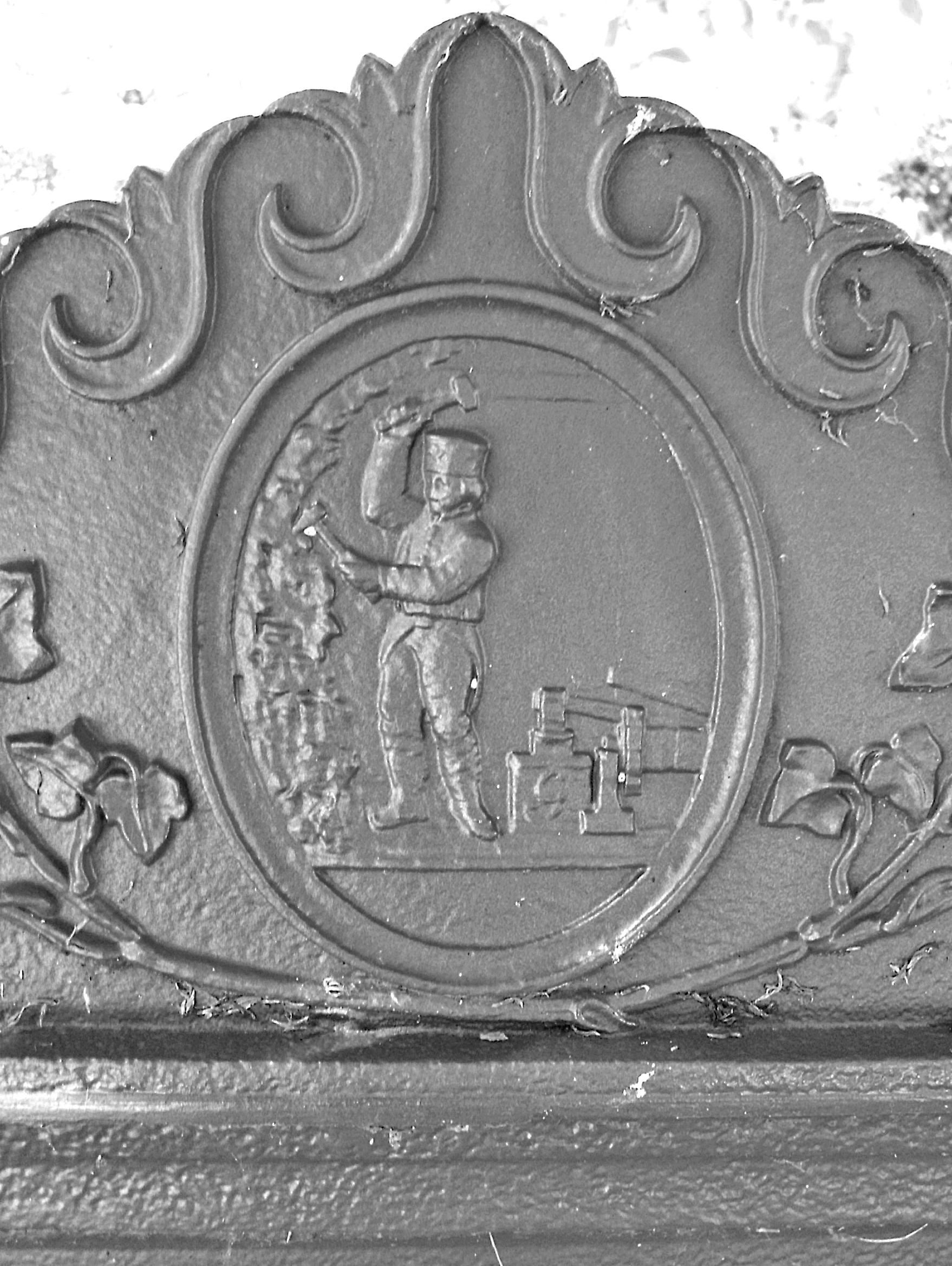 Gienanth-Firmenzeichen (Eisengießer), vom Grabmal des August von Gienanth (1802-1829), Hauptfriedhof Kaiserslautern